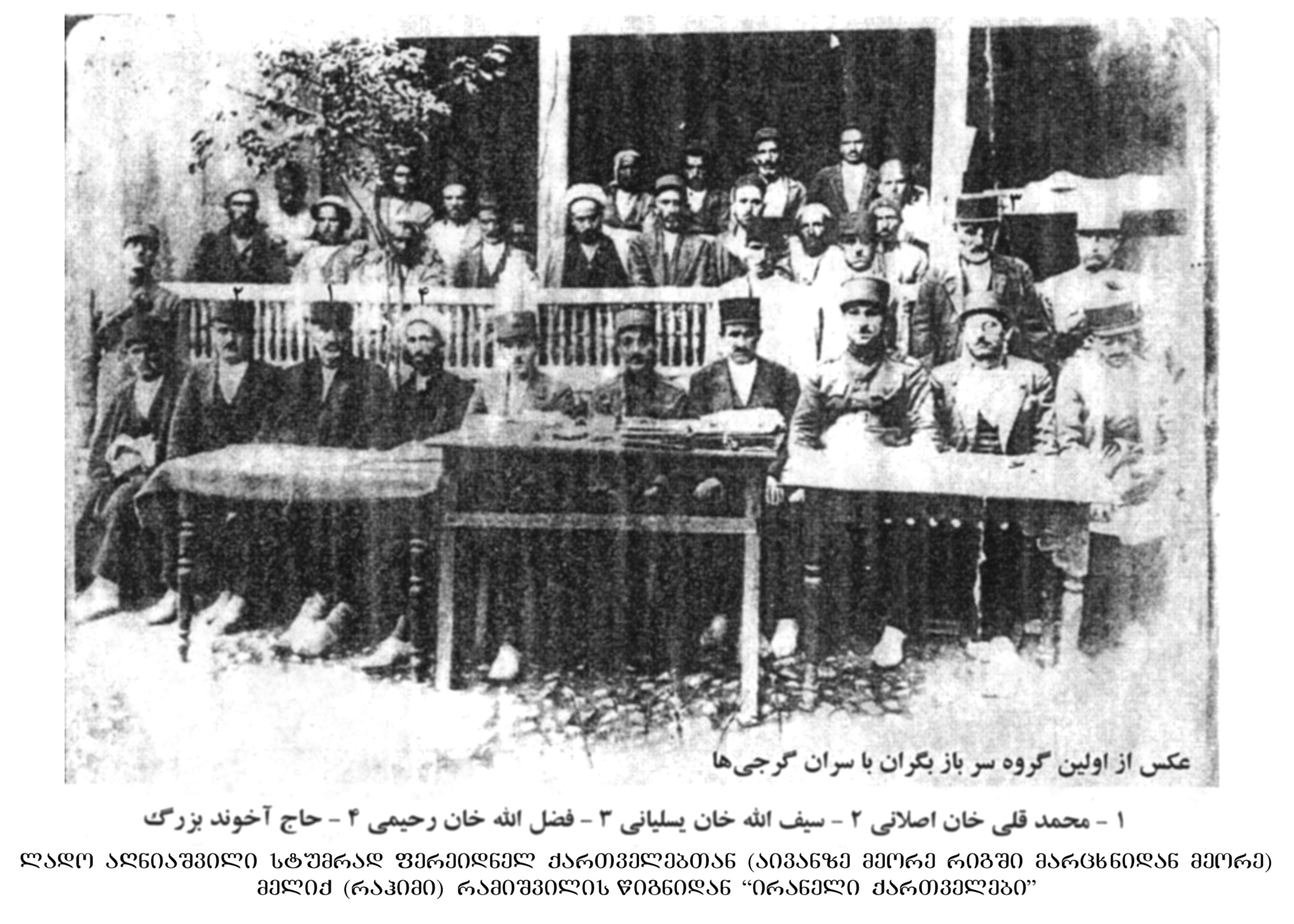 ლადო აღნიაშვილი ფერეიდნელ ქართველებთან. აივანზე მეორე რიგში მარცხნიდან მეორე.